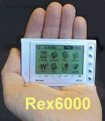 Beschreibung: der Rex 6000, der wohl kleinste PDA der Welt. Quelle: selbst fotografiert. Fotograf: Paul Lenz --Plenz 00:08, 18. Jul 2004 (CEST) Lizenzstatus: GNU FDL